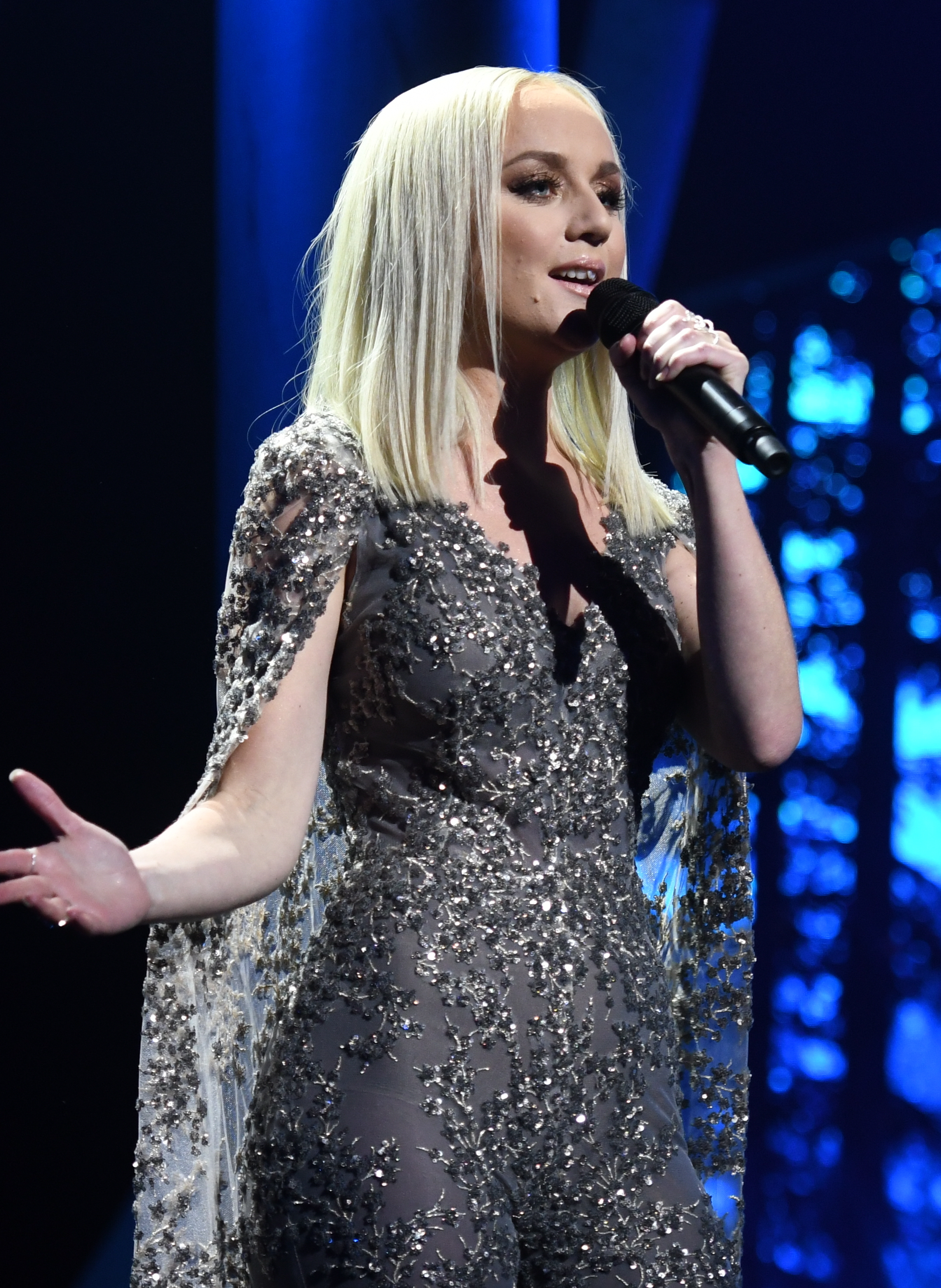 Melodifestivalen 2019, deltävling 1, Scandinavium, Göteborg, Anna Bergendahl